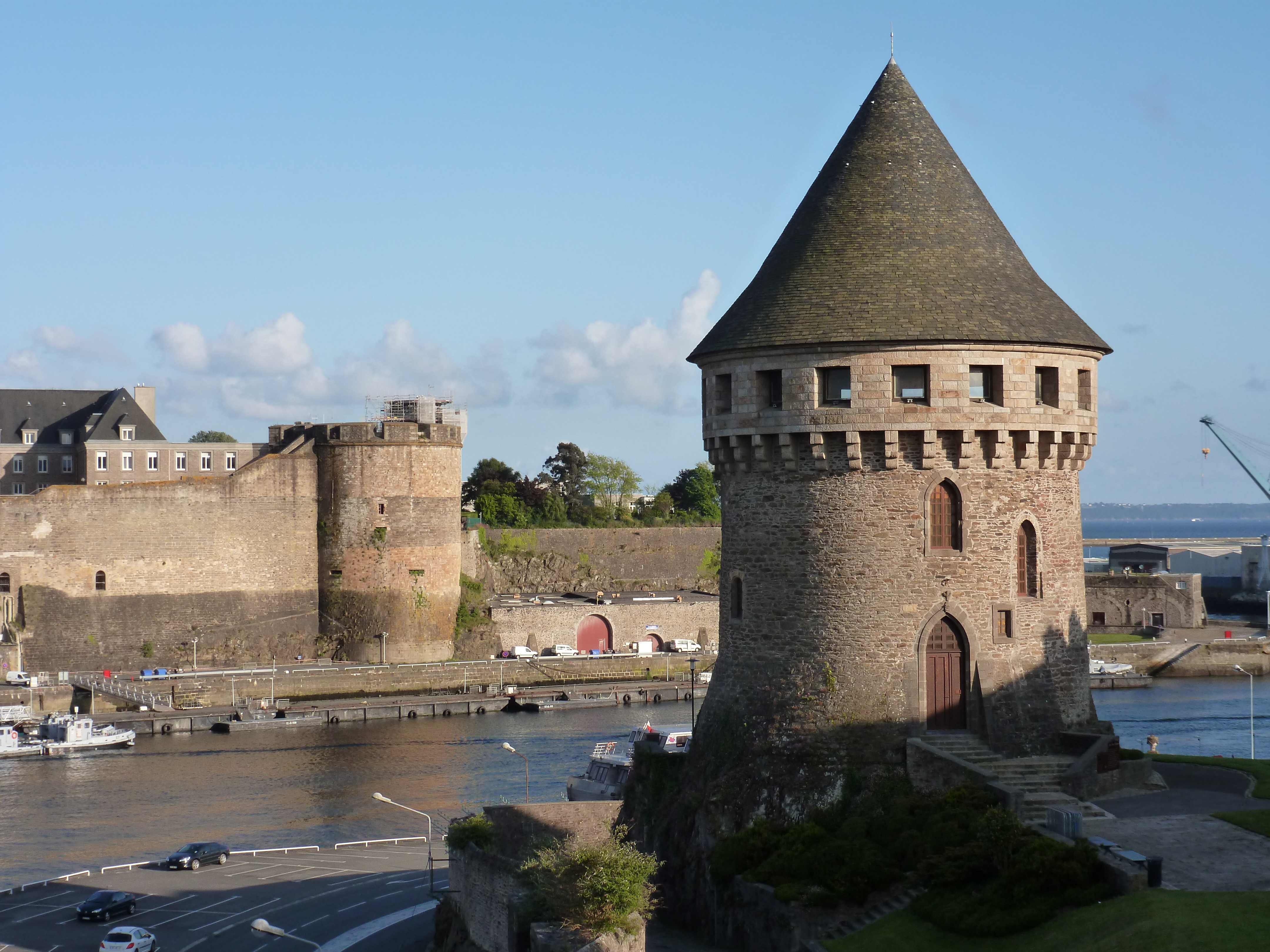 Le château de Brest vu depuis le pont de Recouvrance.